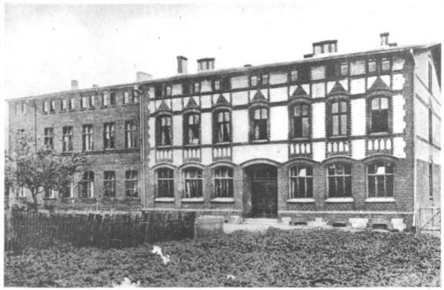 Zdjęcie historyczne, liceum w Miastku (Rummelsburg)